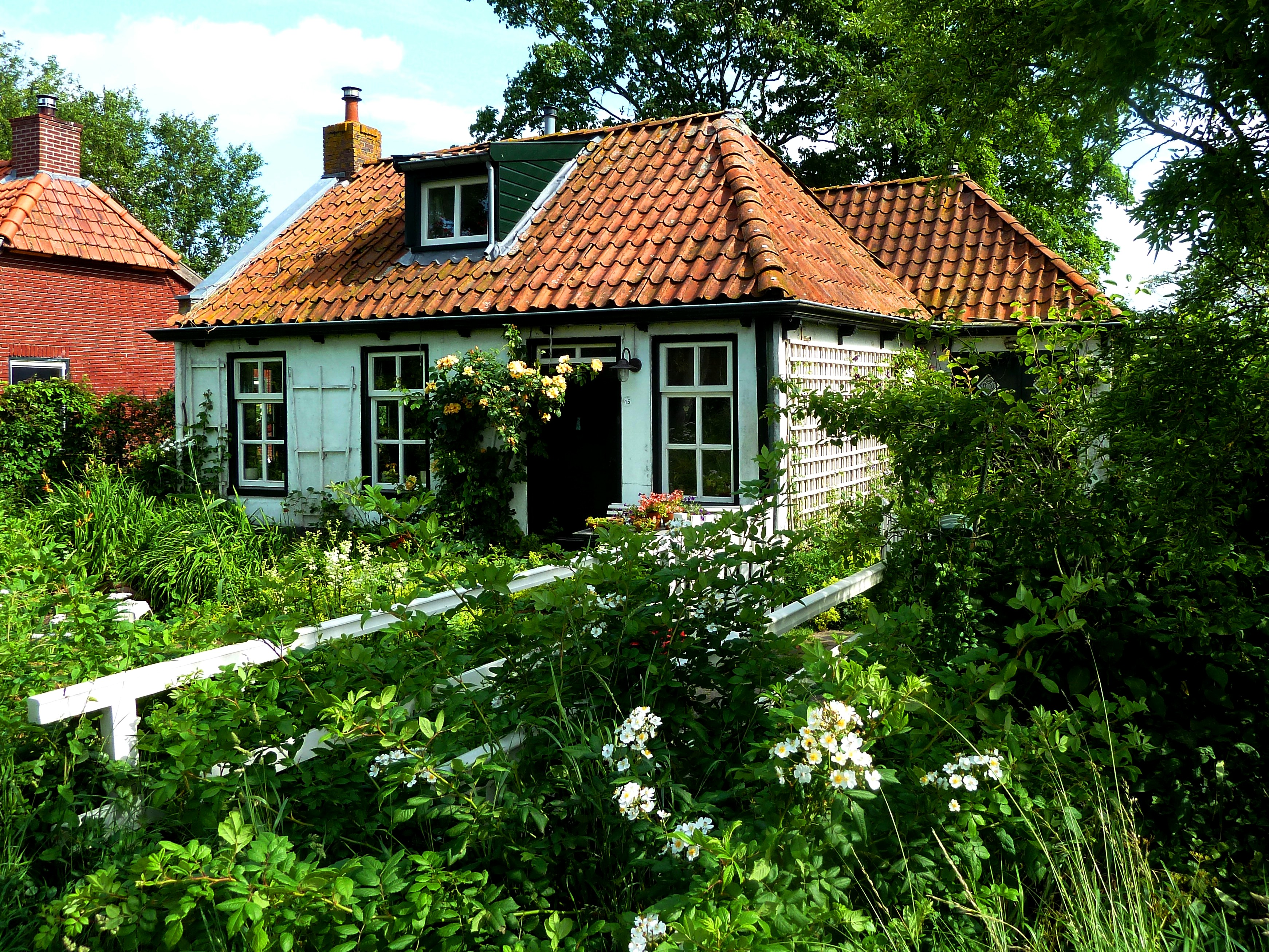 Huis met werkplaats uit 1870 in 2e Nijhoezen